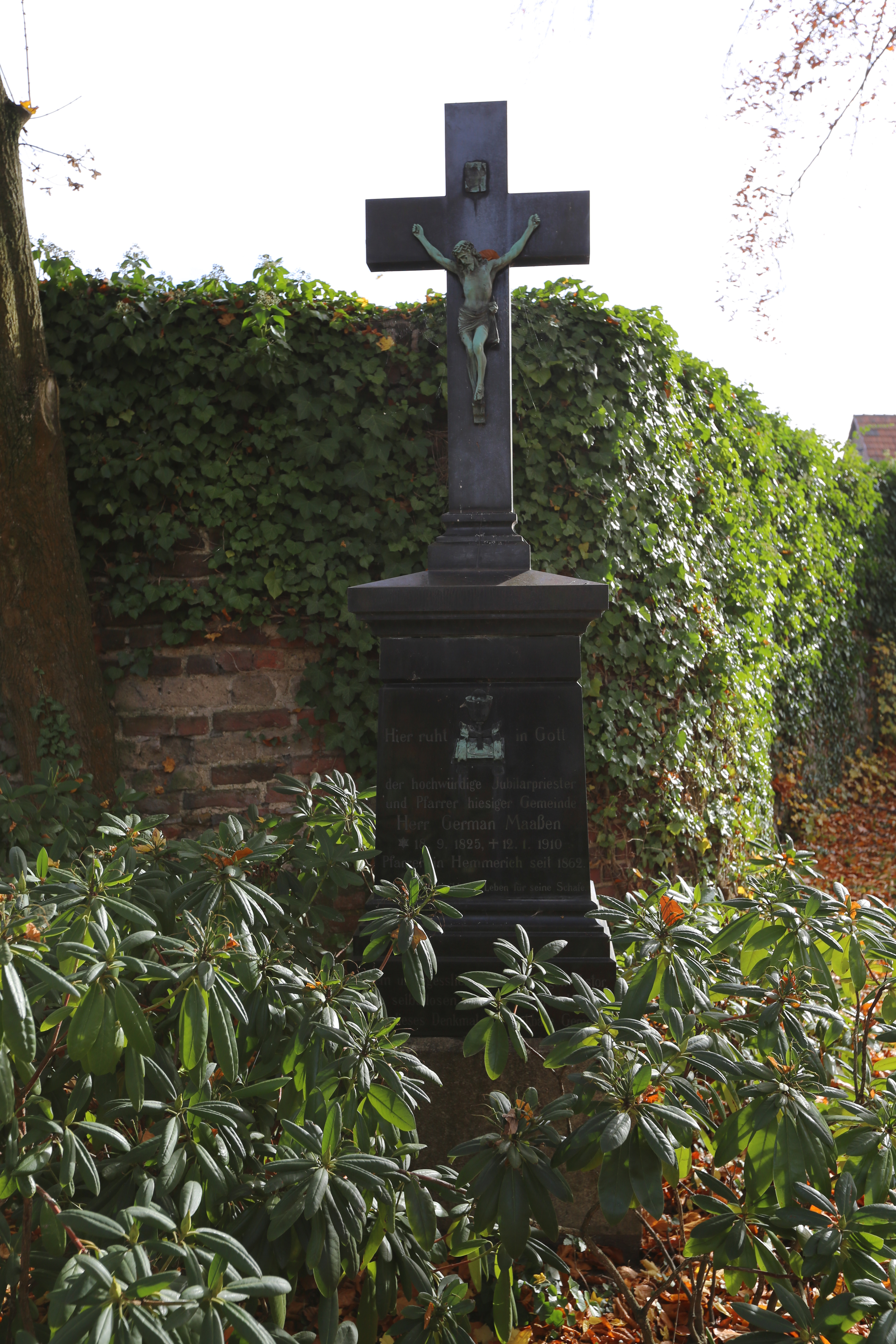 Crabstele des Germman Hubert Christian Maaßen auf dem alten Kirchhocf Hemmerich